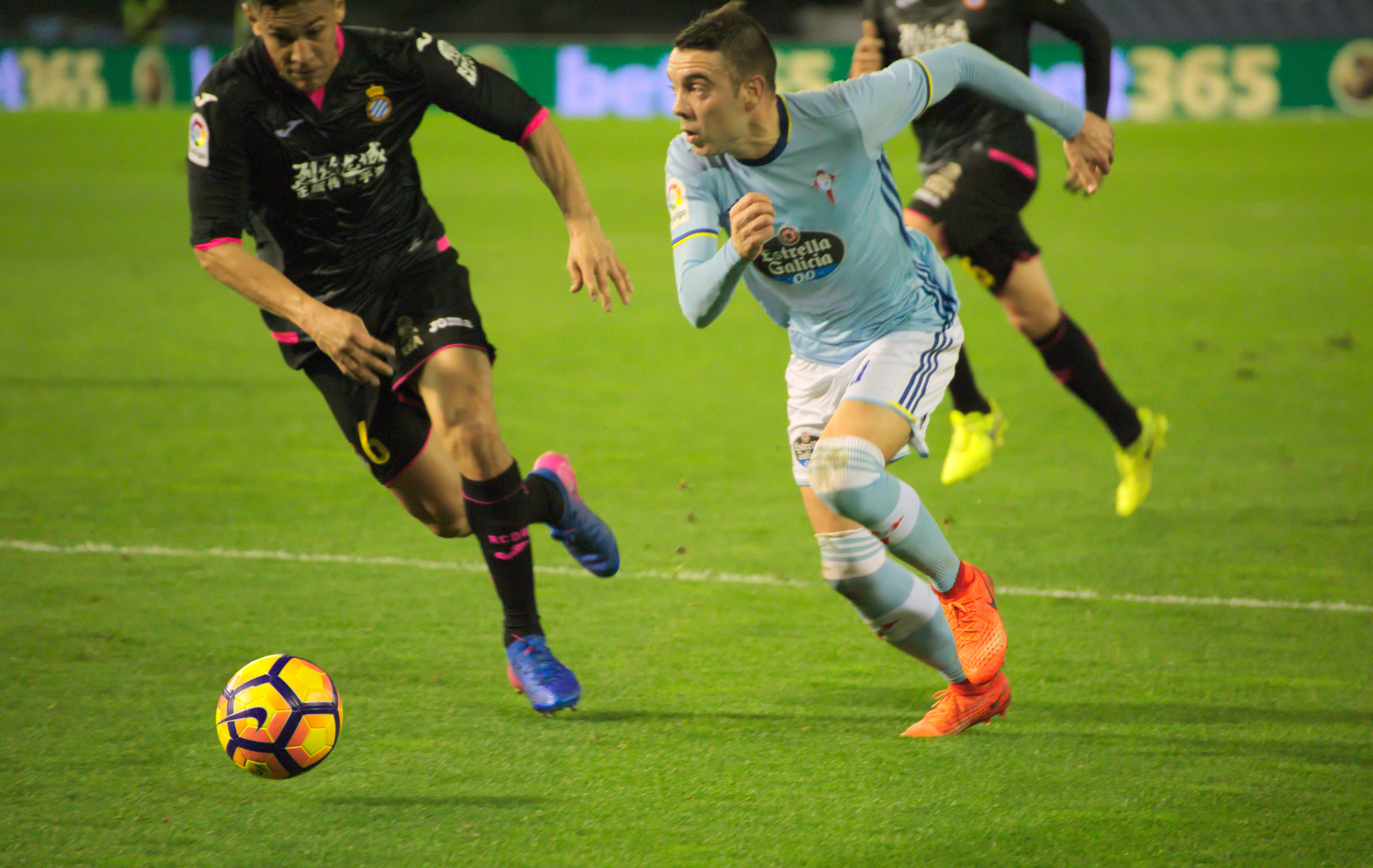 Iago Aspas - Celta de Vigo